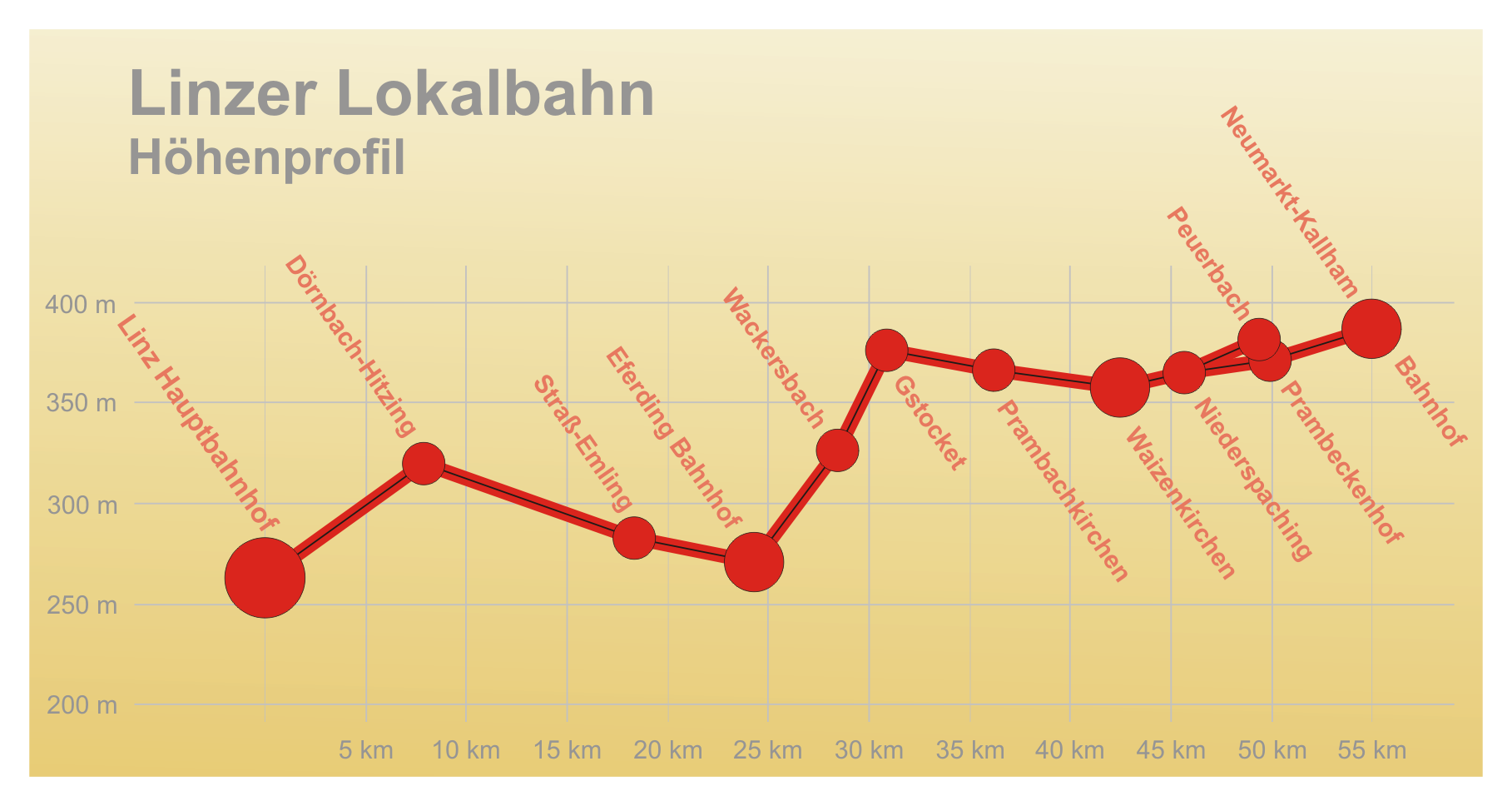 Streckenprofil der Linzer Lokalbahn